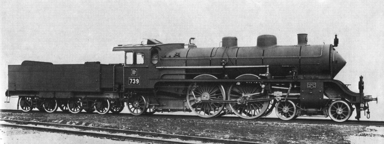 Dampflokomotive Badische II d.